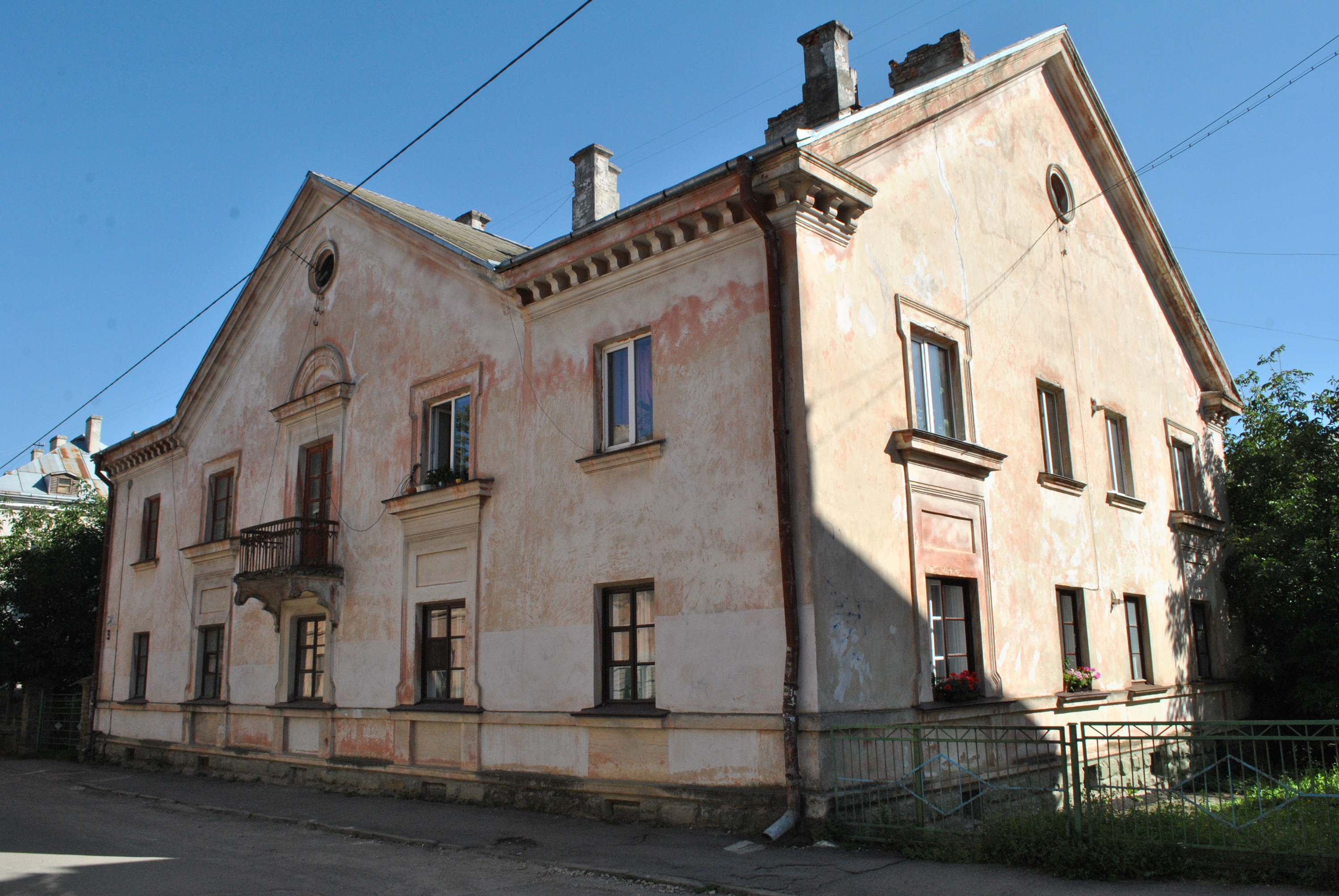 Житловий будинок (мур.) у Тернополі на вул. Багатій, 3.